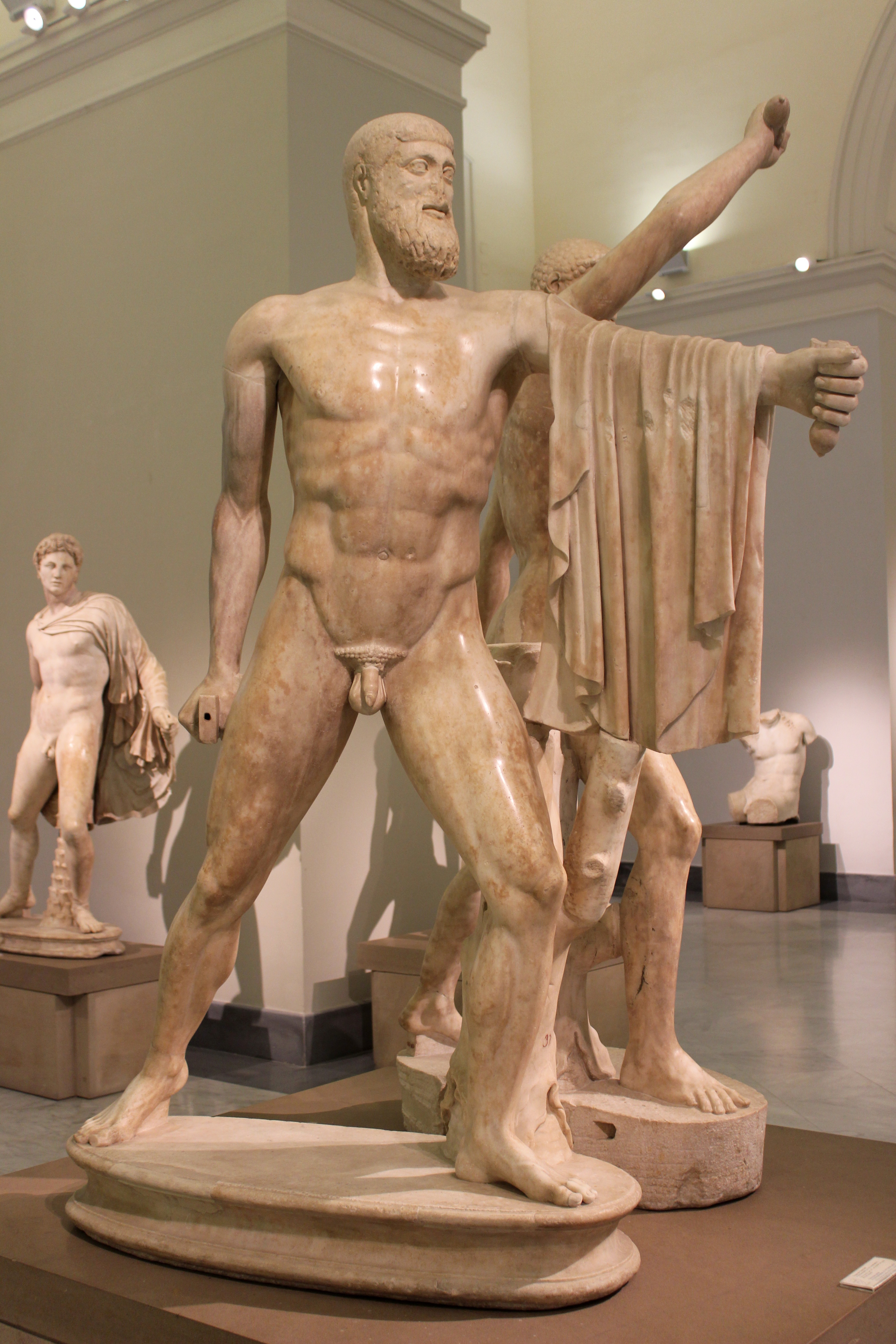 Nápoles, Museo Arqueológico Nacional. Grupo de Harmodio y Aristogeiton.